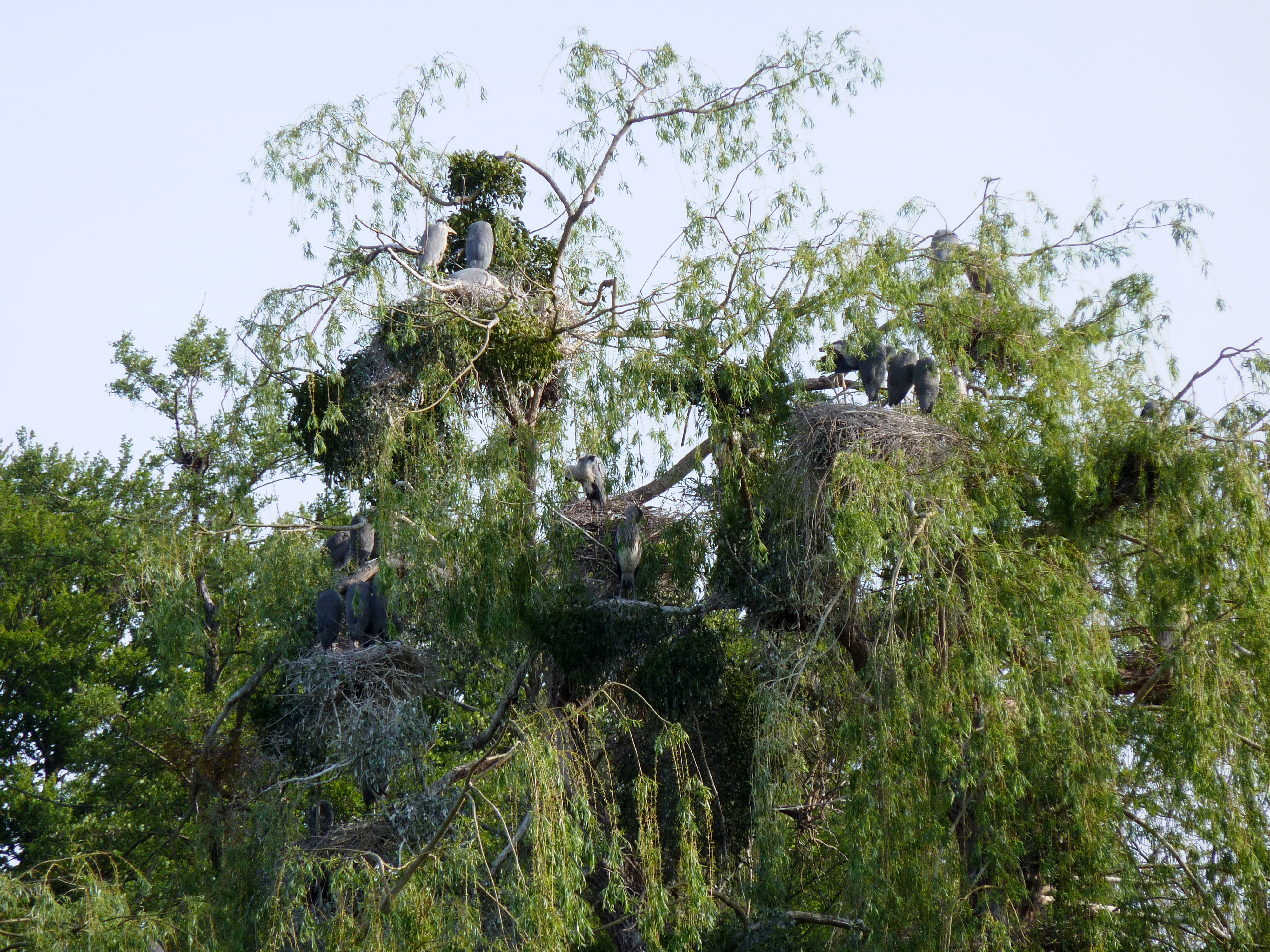 Baum mit mehreren Reihernestern im Levinschen Park in Göttingen, Südniedersachsen. Auf dieser Baumgruppe befinden sich außer den auf dem Foto sichtbaren Reihernestern noch weitere.